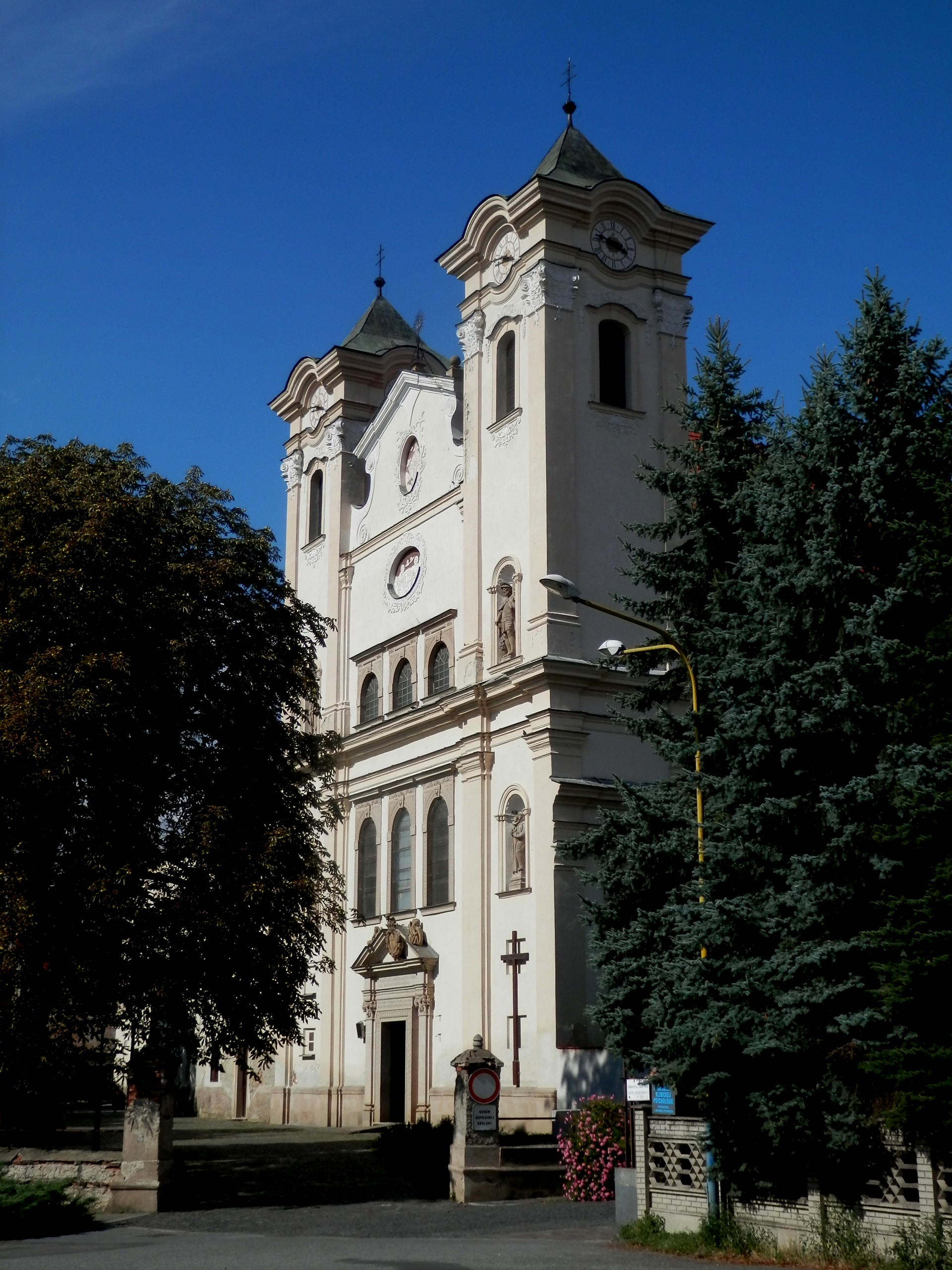 Kostol svätého Jozefa (františkánsky). Barokový jednoloďový, rímskokatolícky kostol. Doba vzniku roku 1380. Františkánske námestie. Mesto Prešov Object location48° 59′ 47.12″ N, 21° 14′ 39.02″ E